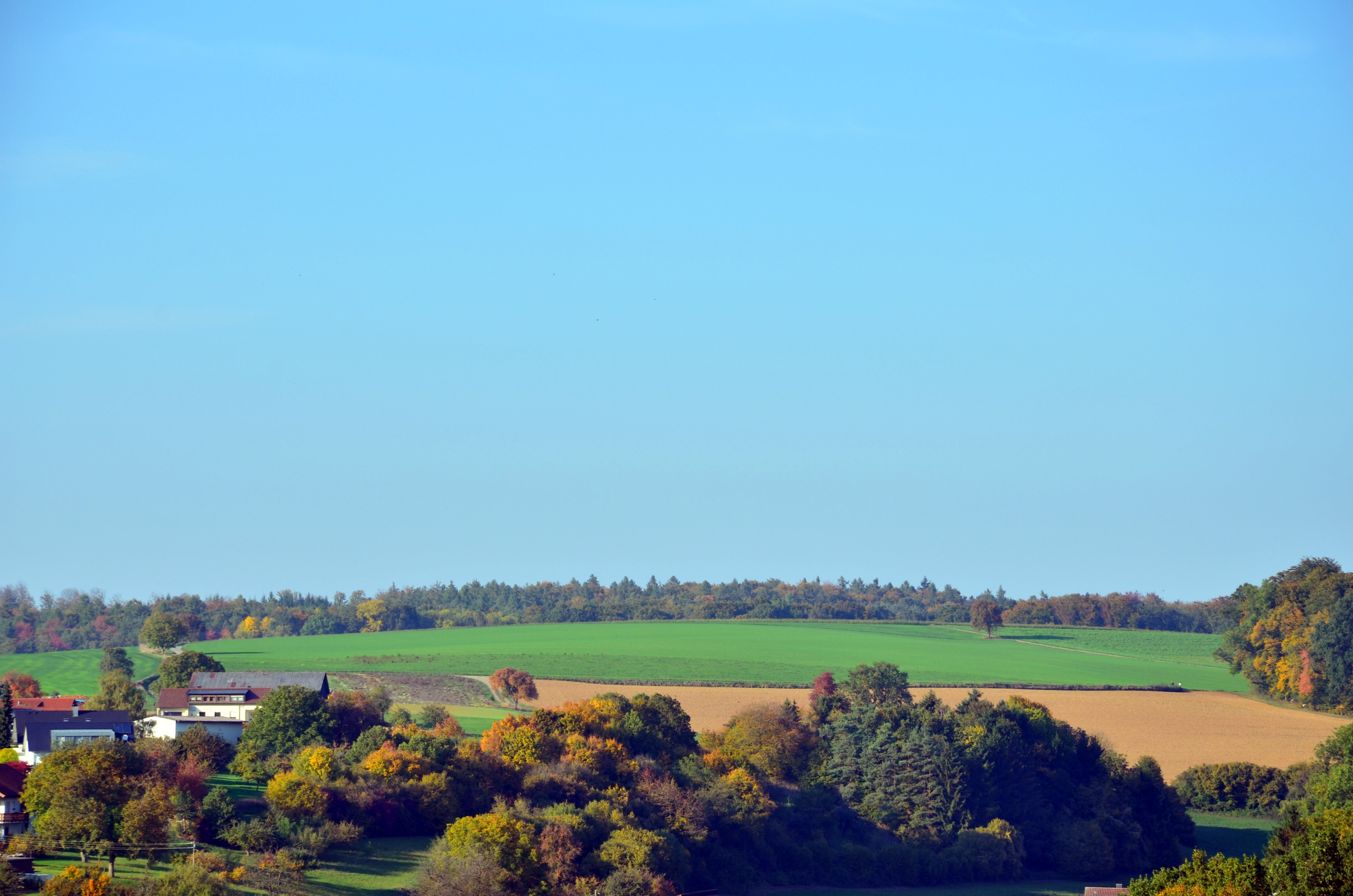 Blick nach Norden auf den Dachs­berg (304m), dahinter der Rand des Waldes Selbach